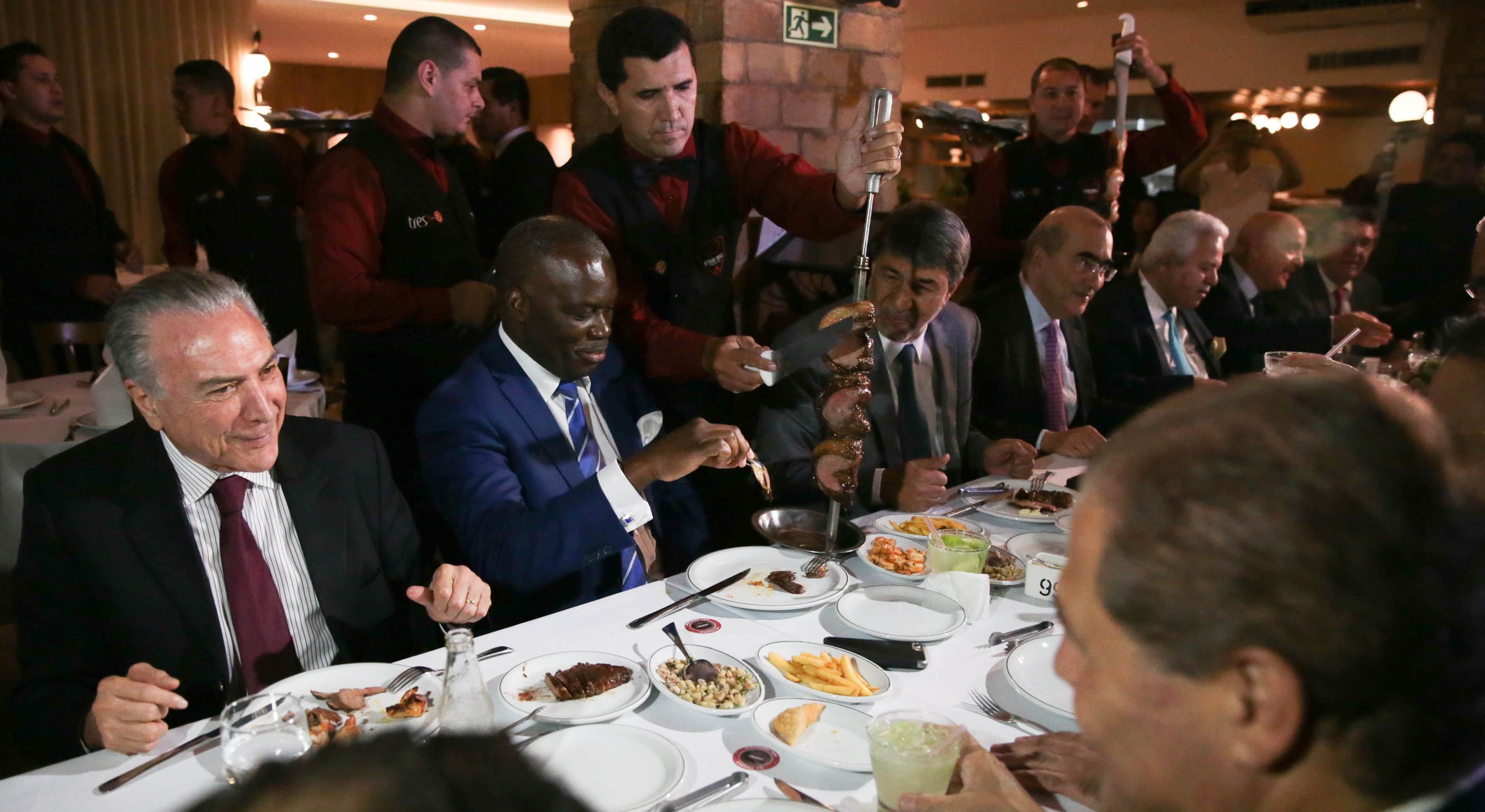 Brasília - Após reunião no palácio do Planalto, o presidente Michel Temer janta em churrascaria com ministros e embaixadores (José Cruz/Agência Brasil)